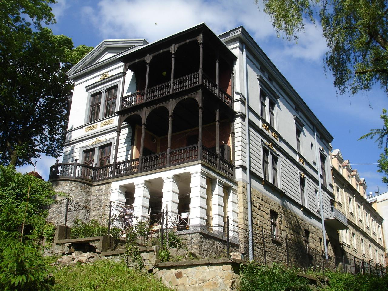 Kamienica Zalewskich od 1940-1944 tajne polskie gimnaqzjum